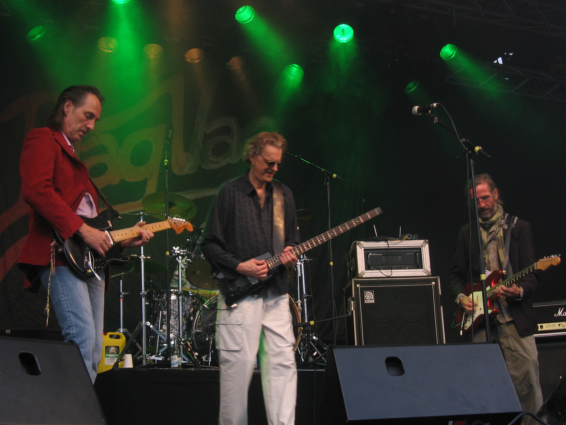 Dag vag, spelning på Trästockfestivalen